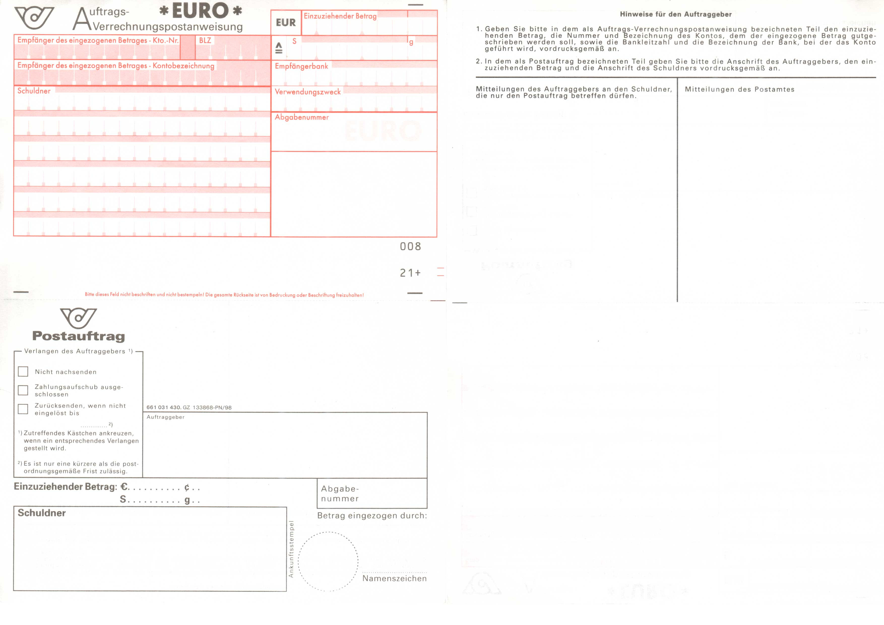 Postauftrag - Möglichkeit, Geld zu mahnen und einzuziehen.